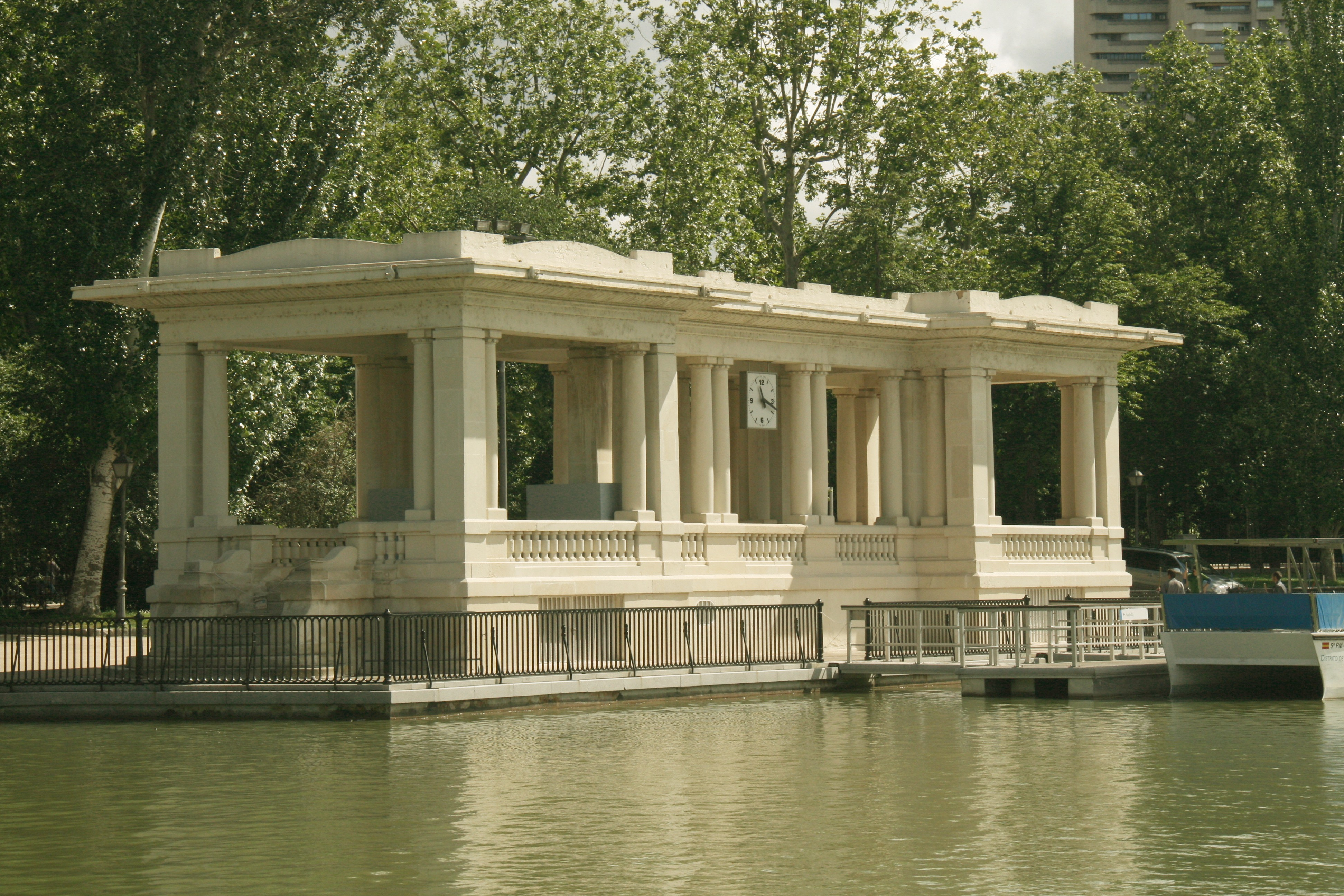 Embarcadero